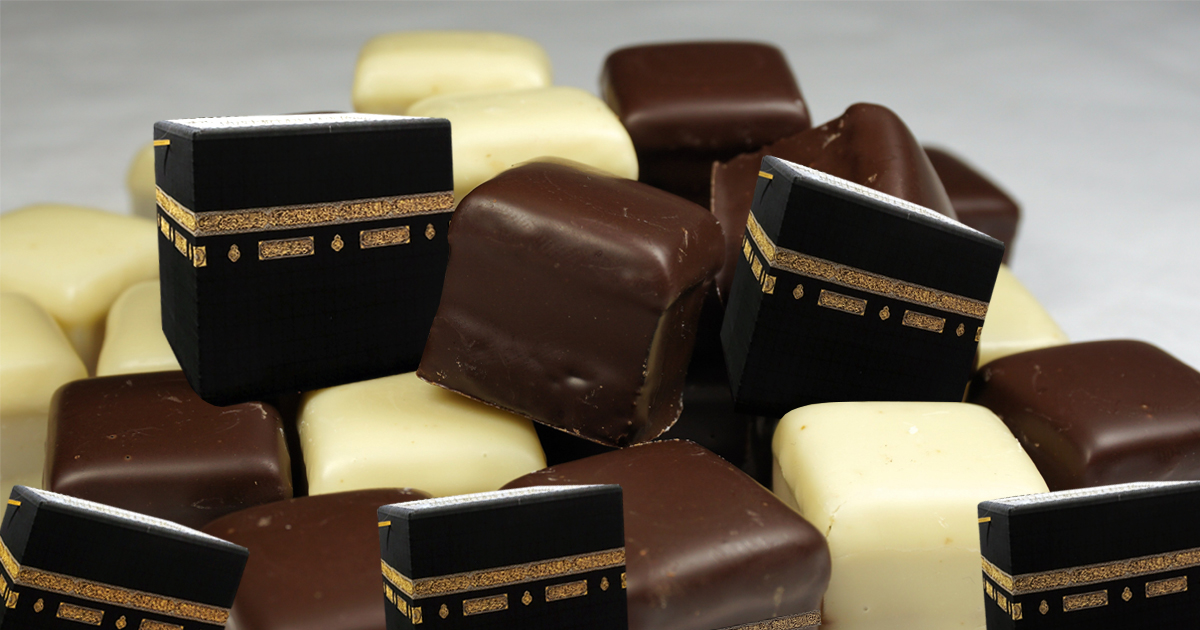 Gelatine- und alkoholfreie Dominosteine im Kaaba-Look aus dunkler Zartbitterschokolade mit einem feinen vergoldeten Zierrand und einer Creme Füllung aus Milchcreme und Honig. Fotomontage des Satiremagazins Noktara.